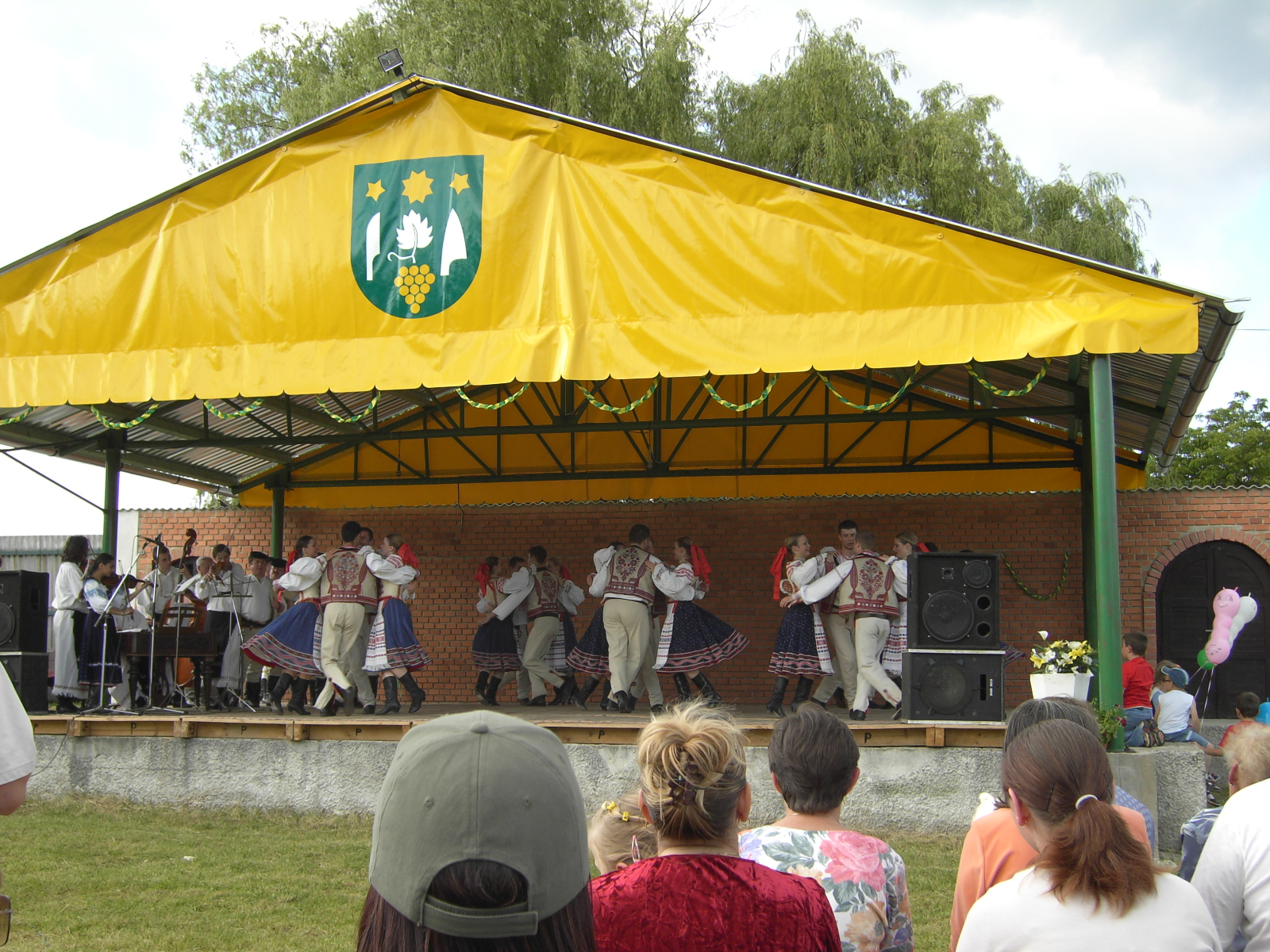 Beschreibung: Folklore beim Falunap (Dorftag) in Csáb eigenes Foto von User:Ralf 69 Datum:11.06.2006